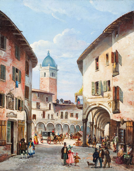 Peinture de la place des Herbes (piazza delle Erbe) à Novare (Italie), huile sur toile, vers 1840, attribuée à Paolo Finazzi